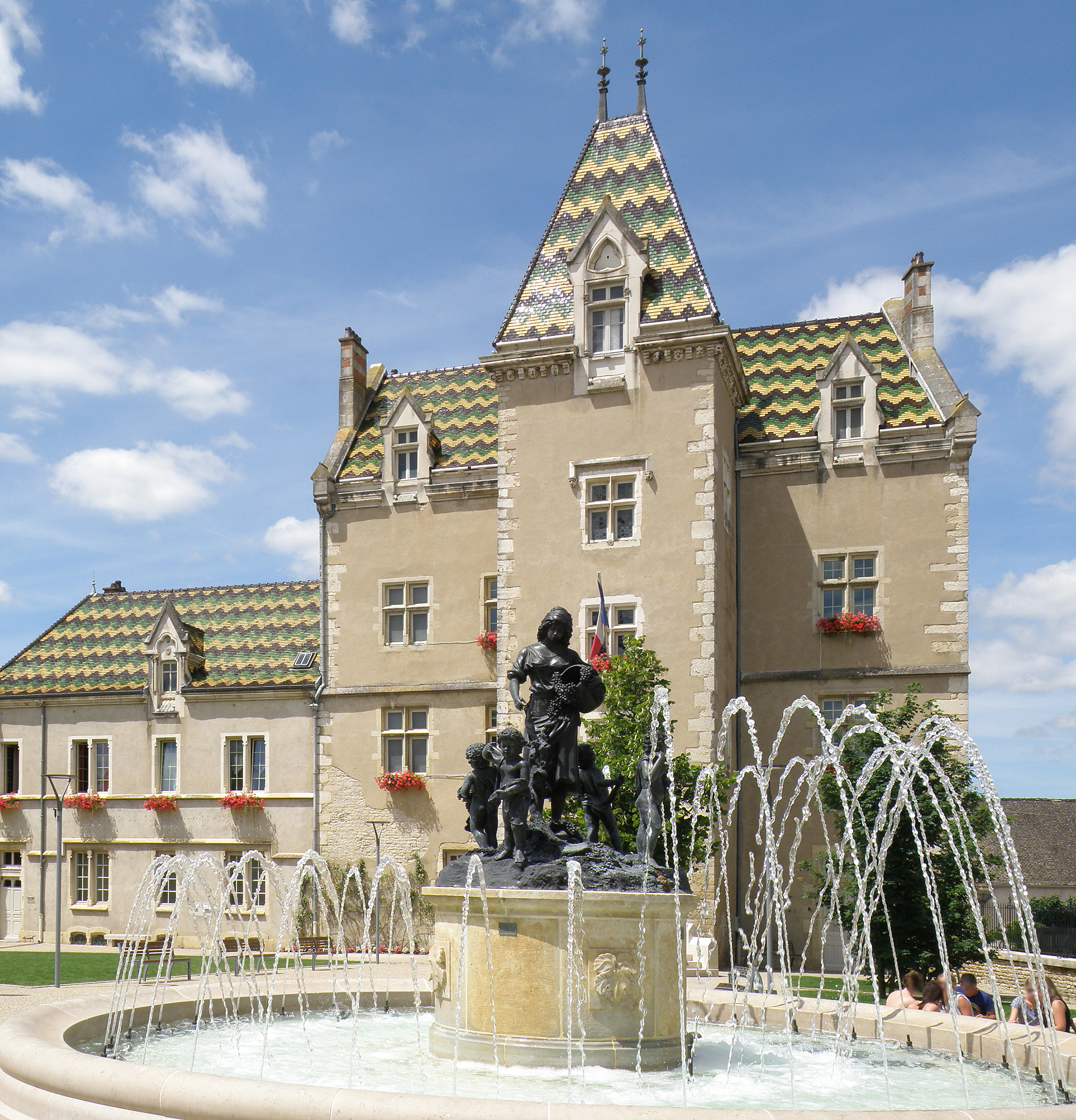 Meursault (Côte-d'Or, Bourgogne, France). Ancien château-fort, aujourd'hui hôtel de ville.